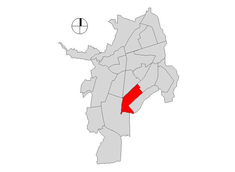 Comuna 16 de Santiago de Cali, Colombia.